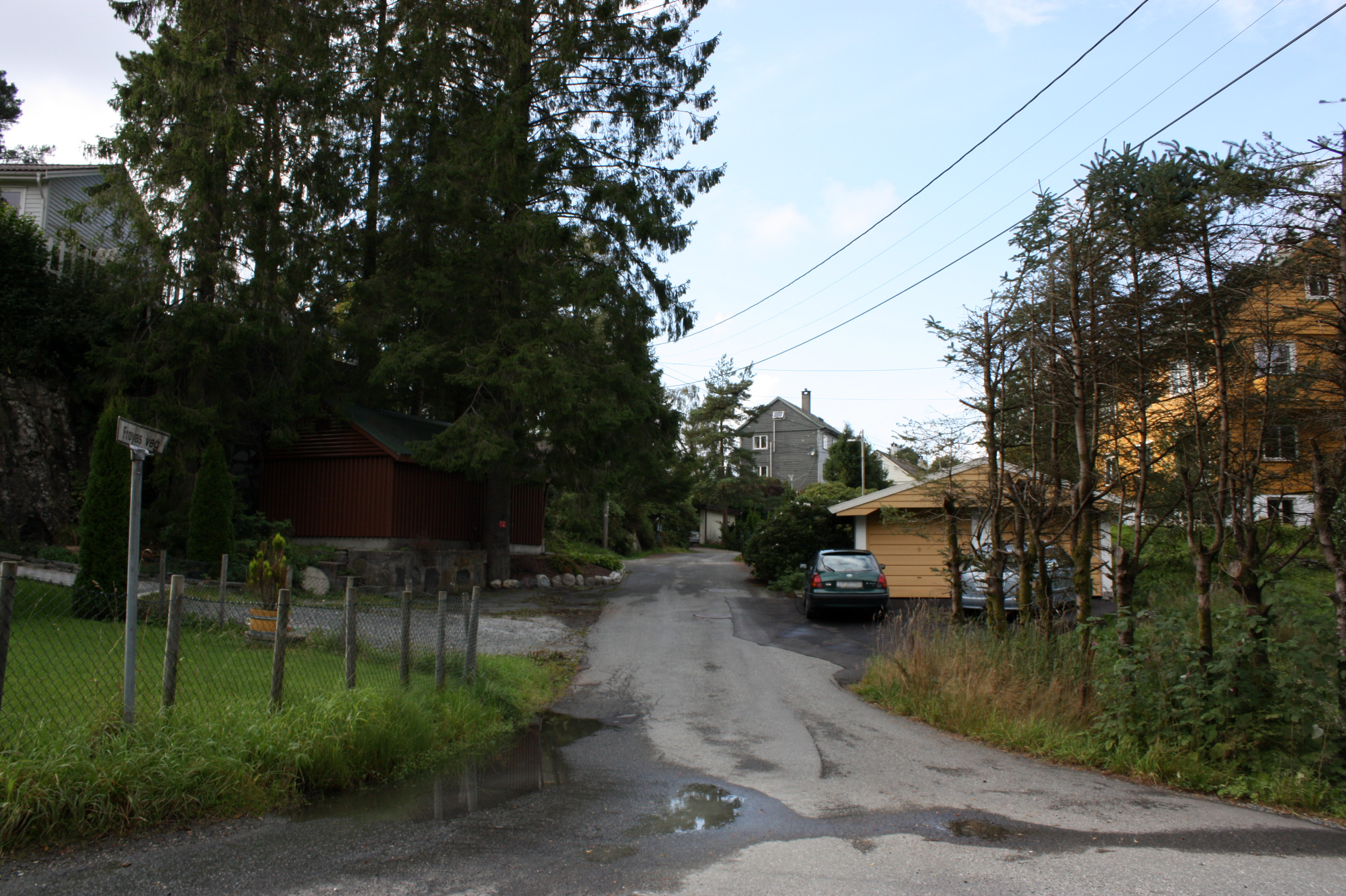 Frøyas veg, Fana, Bergen.